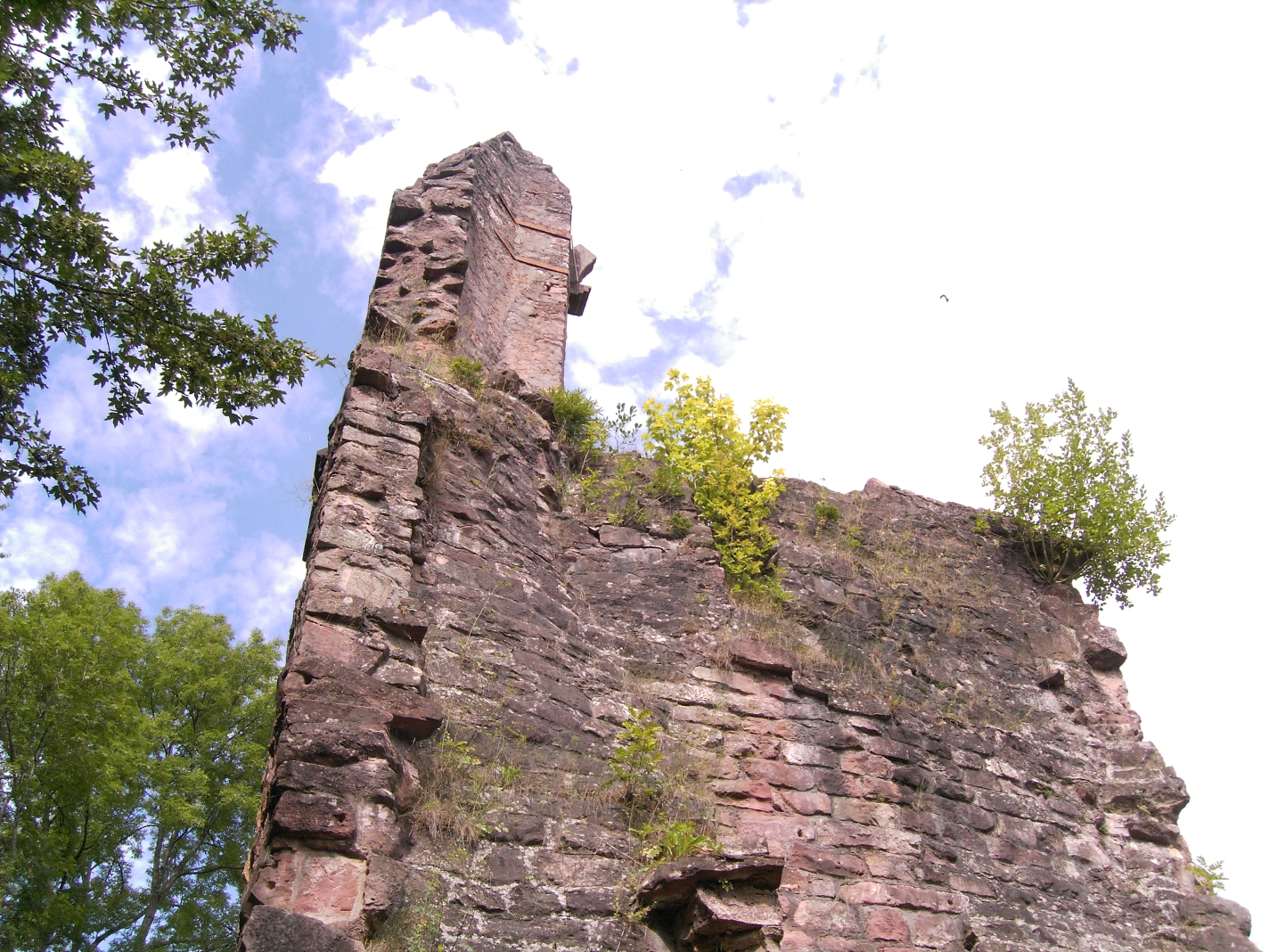 Burgruine Sterneck (Loßburg, Baden-Württemberg, Deutschland)